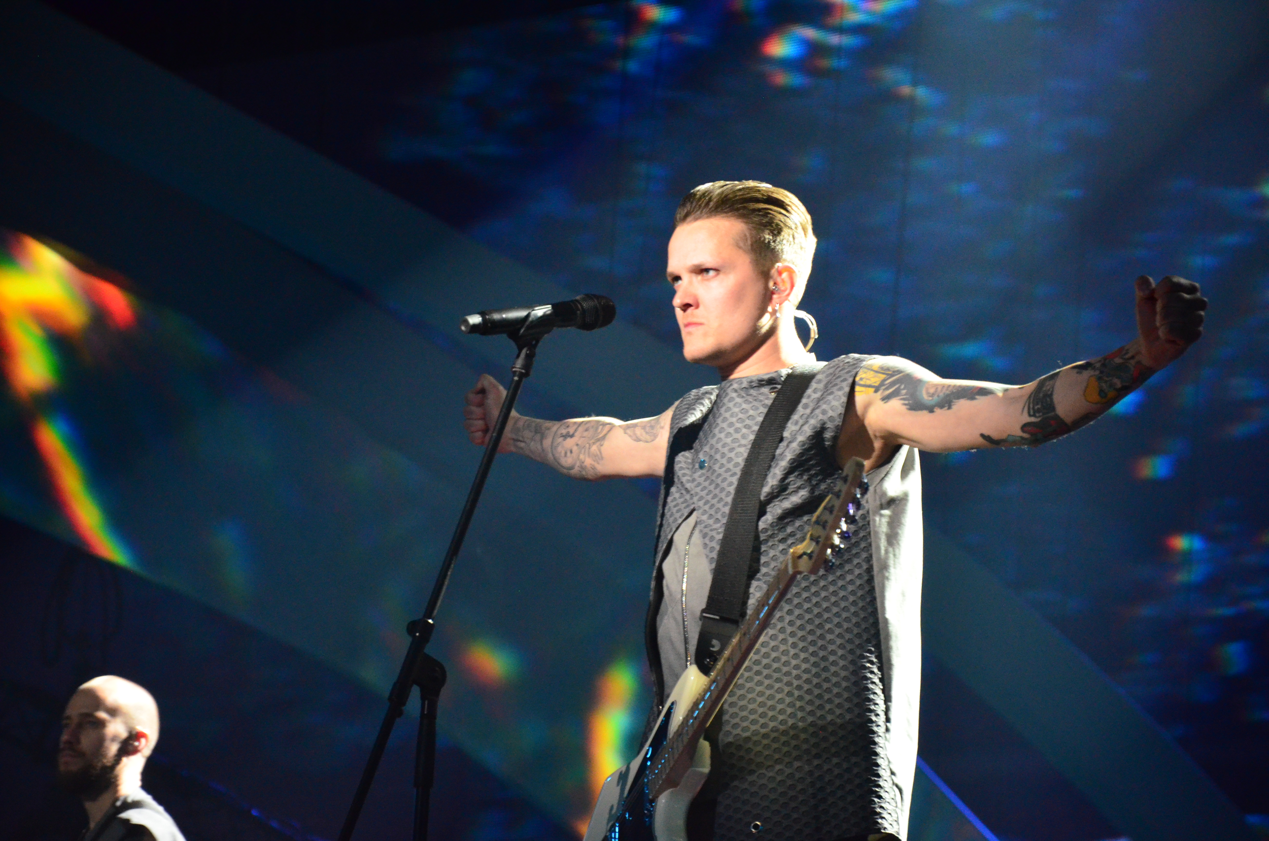 10 травня 2017 року у Києві відбулась генеральна репетиція 2 півфіналу "Євробачення". На фото - гурт O.Torvald, Україна